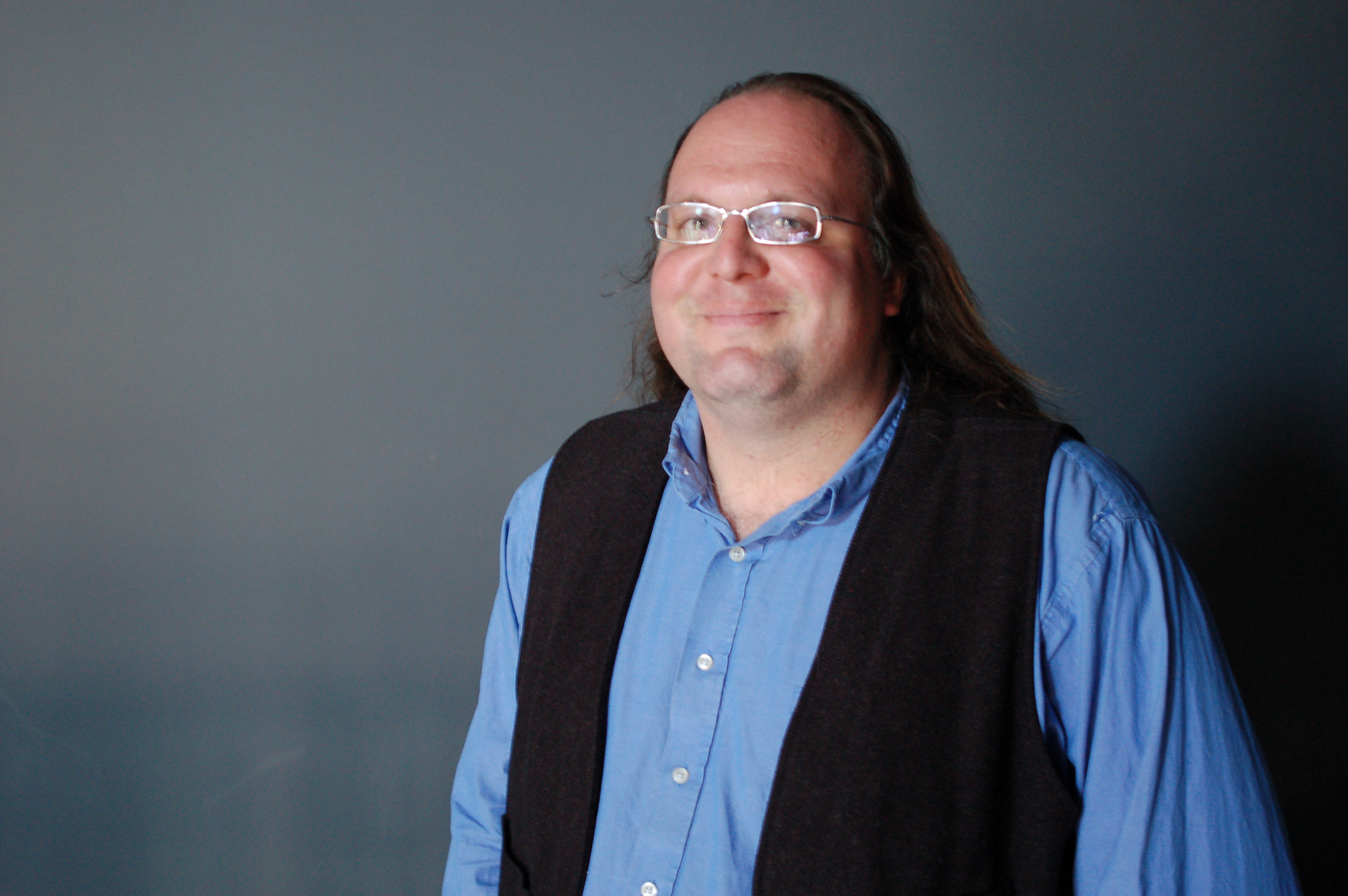 Ethan Zuckerman